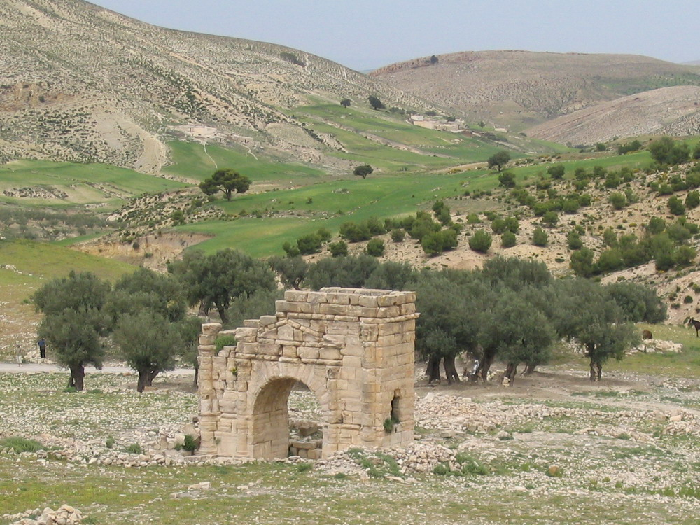 ruines romaines